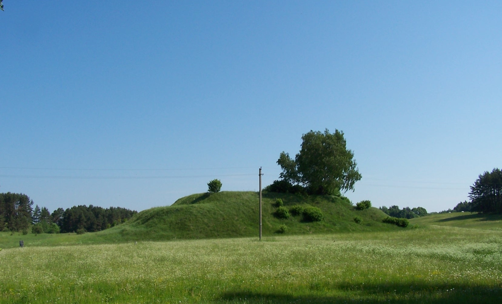 Gaigalių piliakalnis